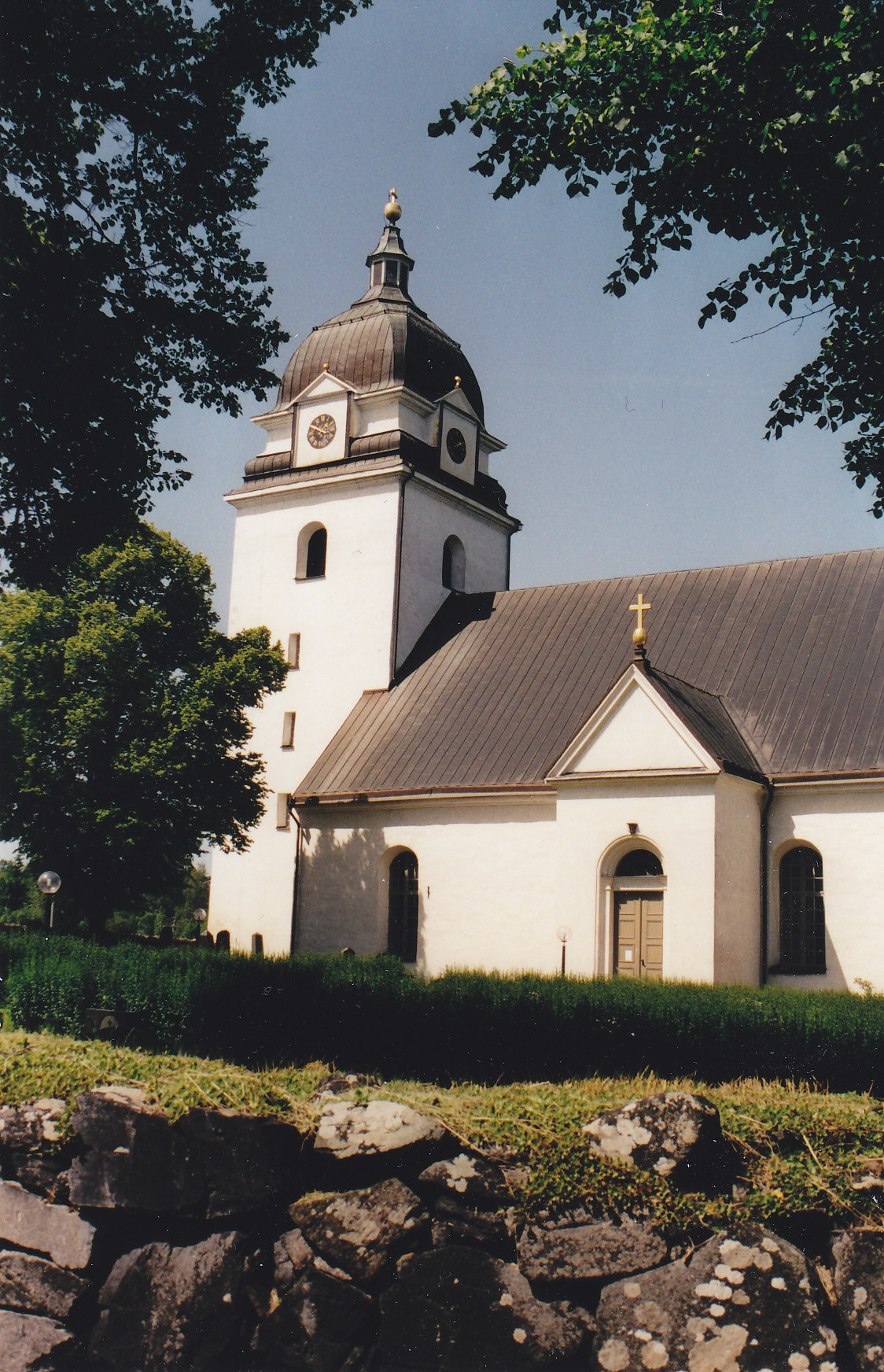 Alseda kyrka.